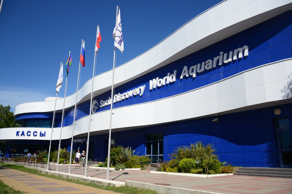 Адлерский океанариум